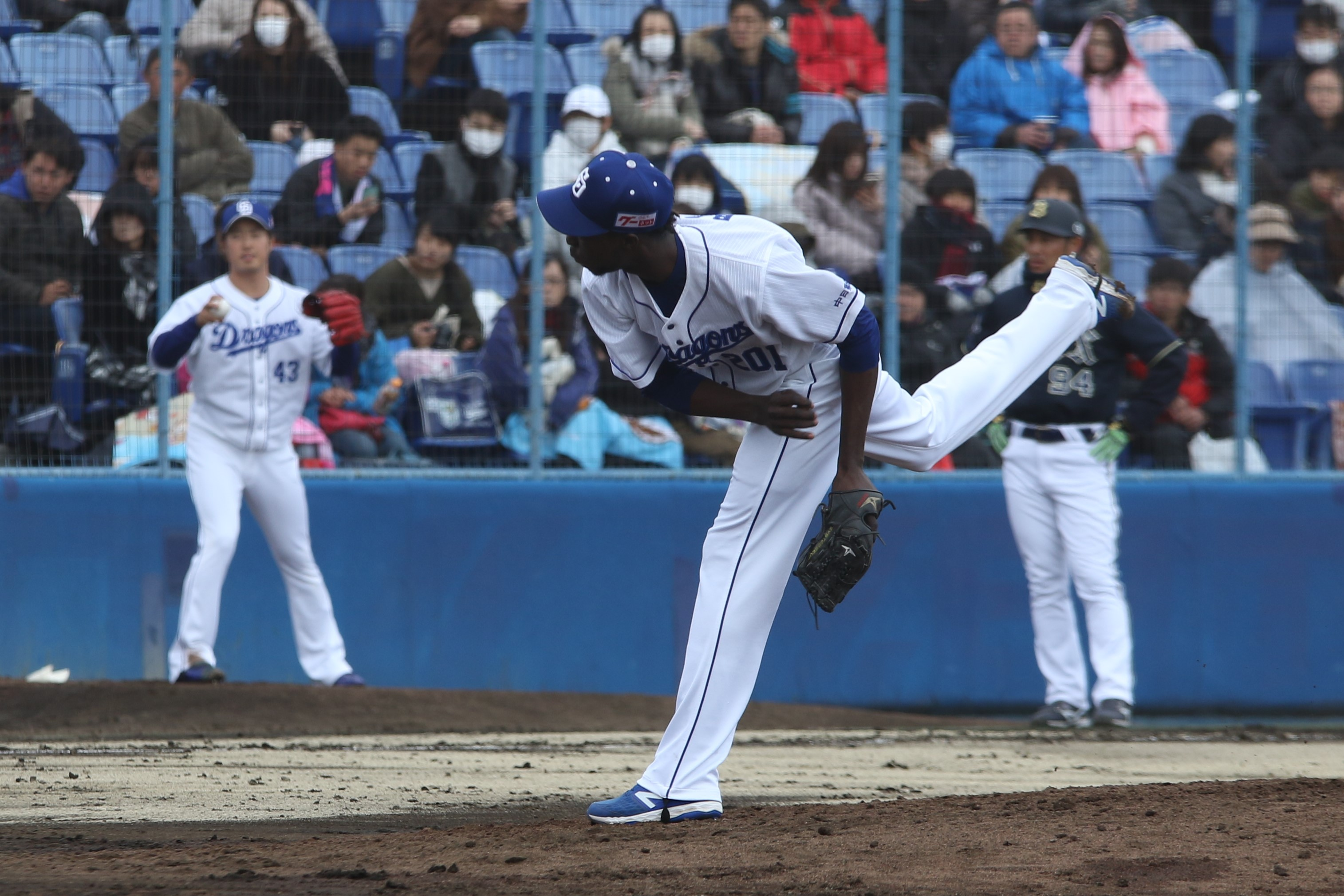 中日ドラゴンズ時代 （2019年3月17日、ナゴヤ球場にて）